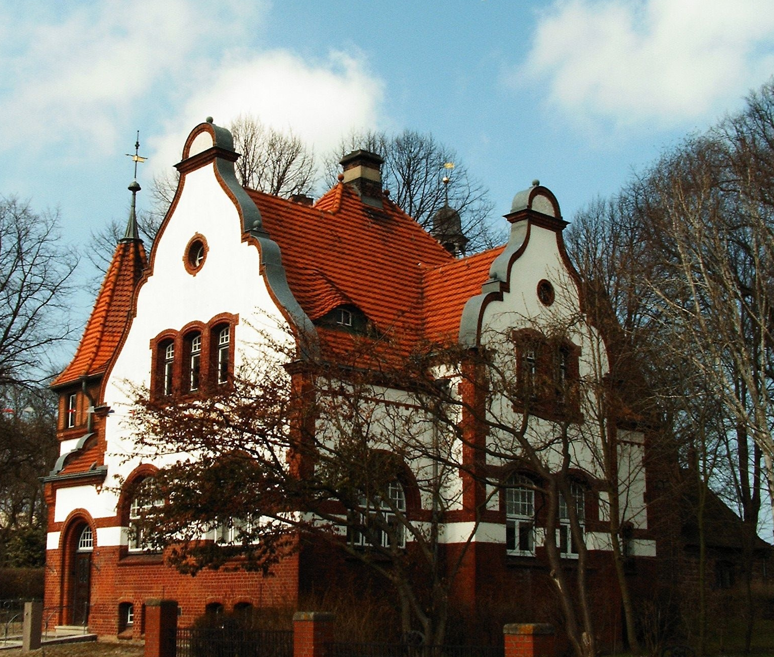 Heimatmuseum in Heiligenhafen